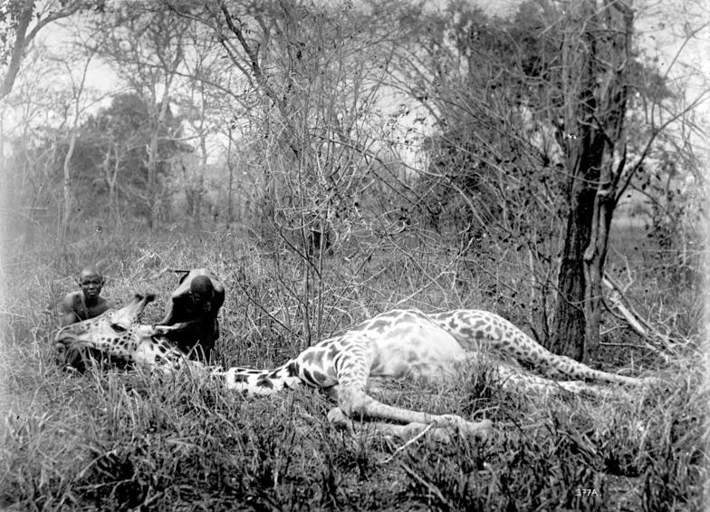 Giraffe